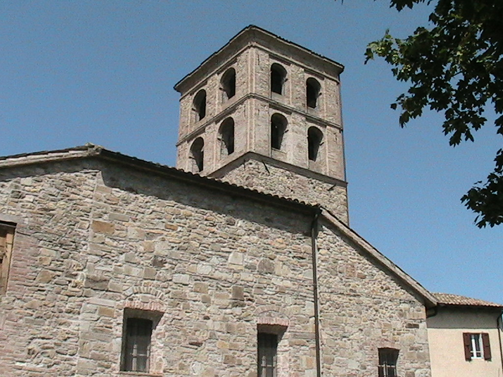 Bardone (Terenzo) - Pieve di Santa Maria Assunta